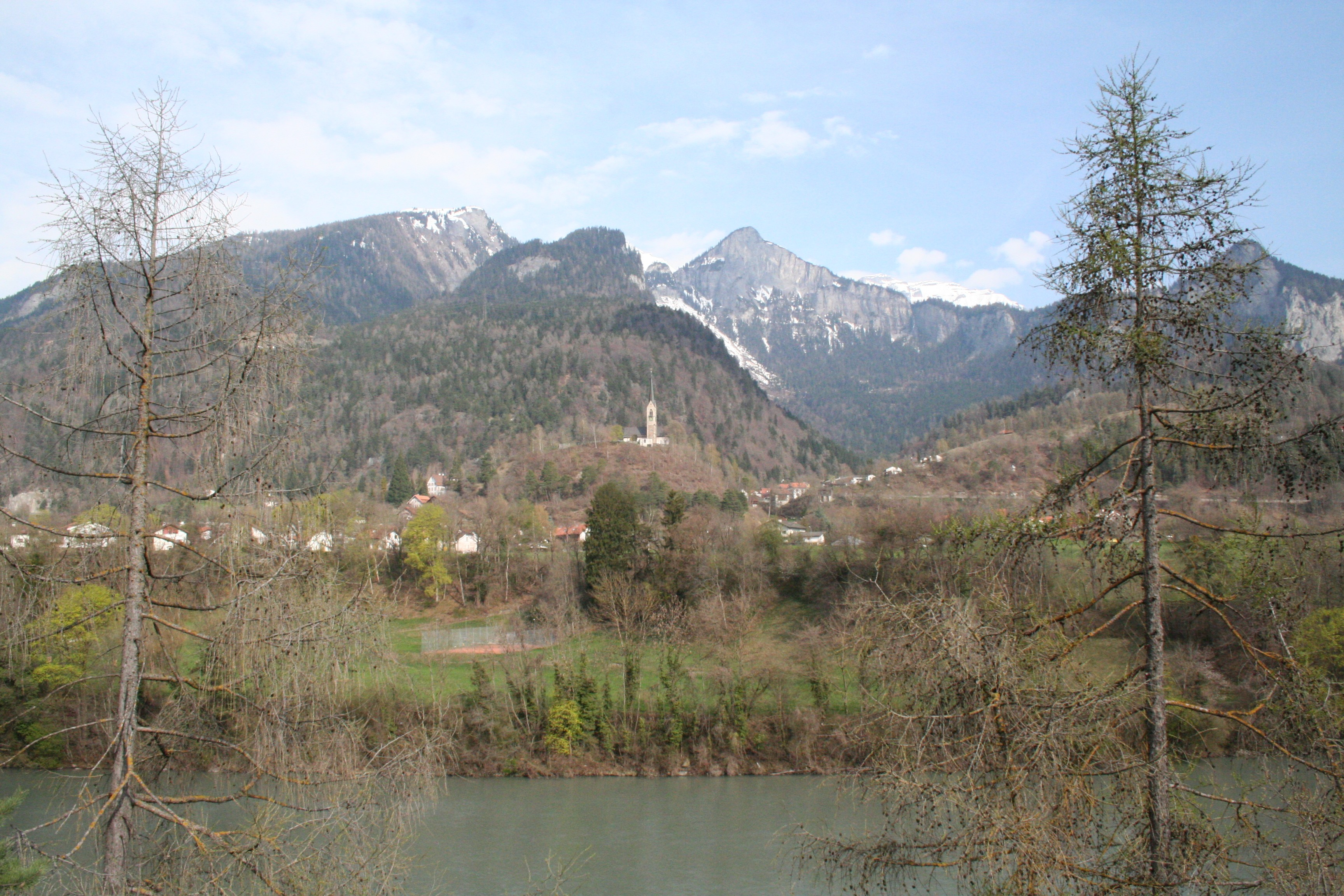 Tamins